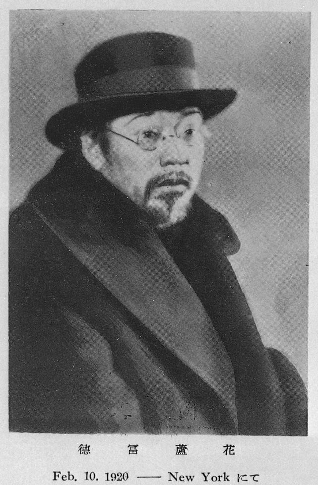 Portrait of Tokutomi Roka (徳冨蘆花, 1868 – 1927)